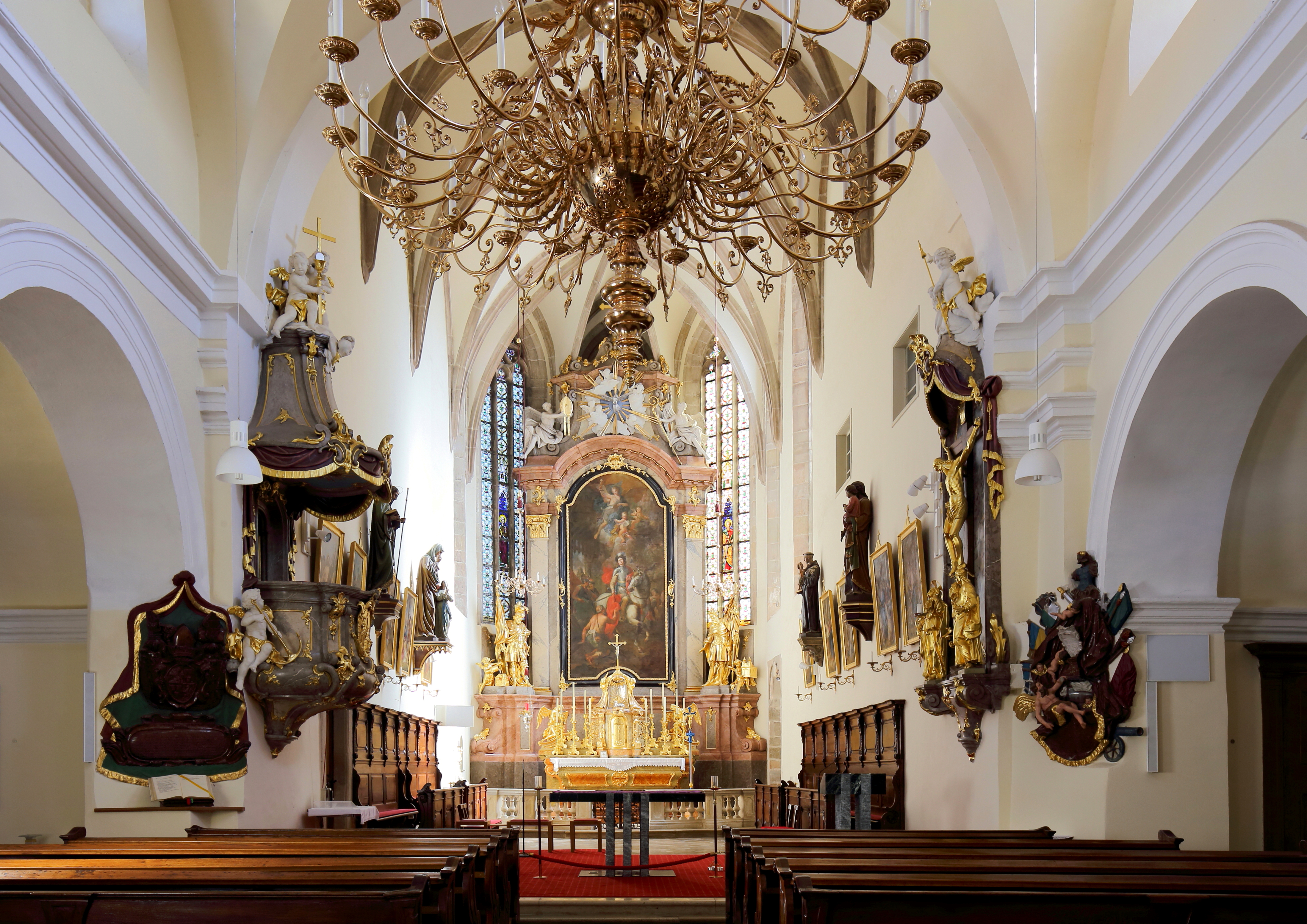 Innenansicht Richtung Hochaltar der katholischen Pfarrkirche hl. Martin in der niederösterreichischen Marktgemeinde Pillichsdorf. Die Innenausstattung stammt vorwiegend aus dem 3. Viertel des 18. Jahrhunderts.